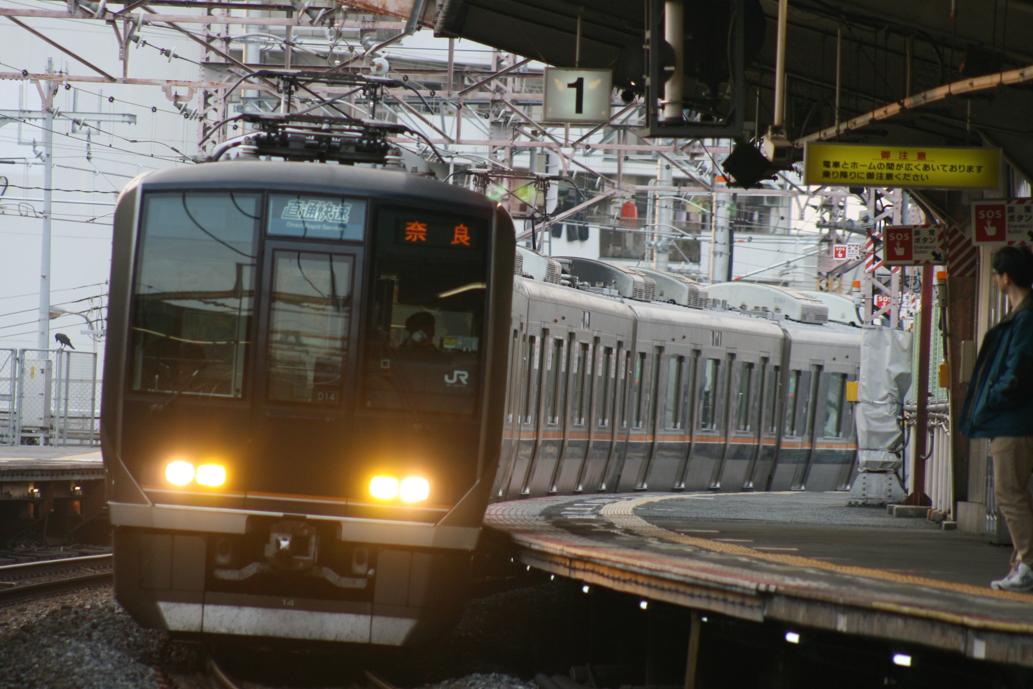 片町線（学研都市線）、鴫野駅で撮影。D14編成。